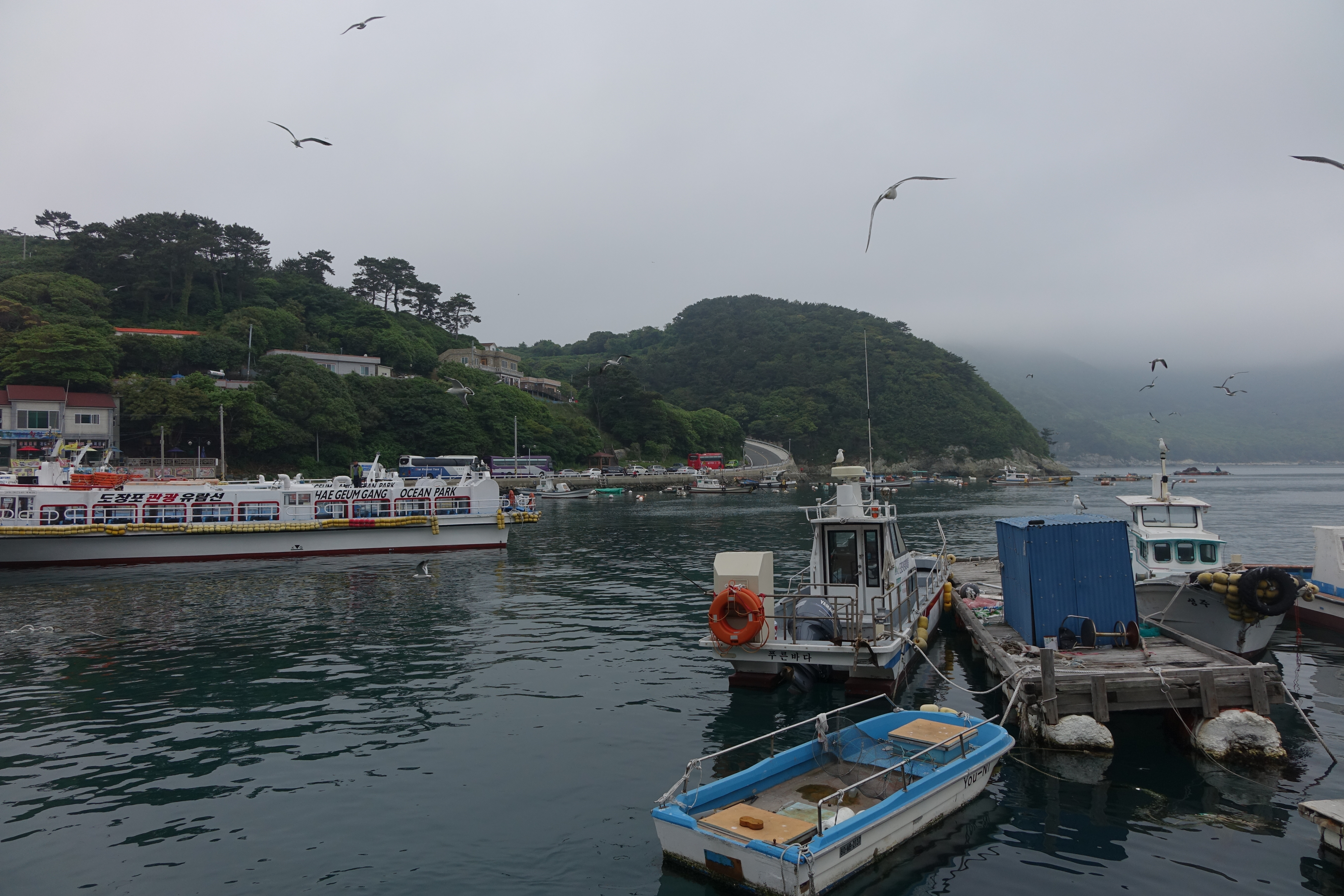 2014년 5월 경상남도 거제시 바람의언덕